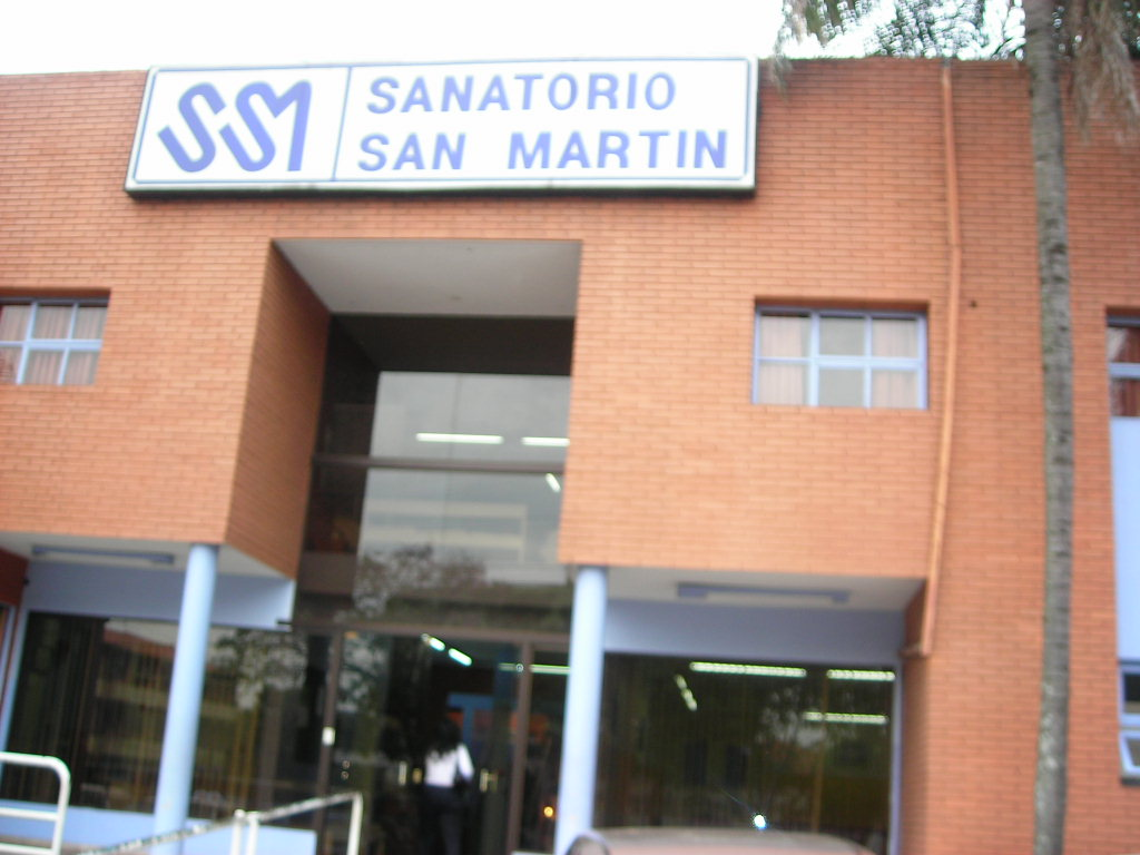 samar